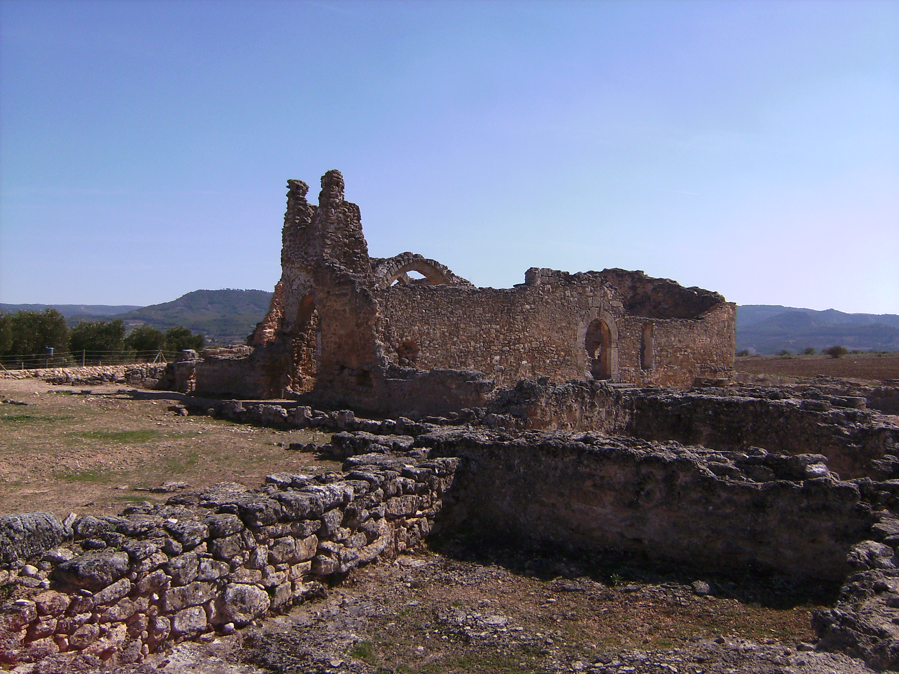 Recopolis - Basilica (Exterior)